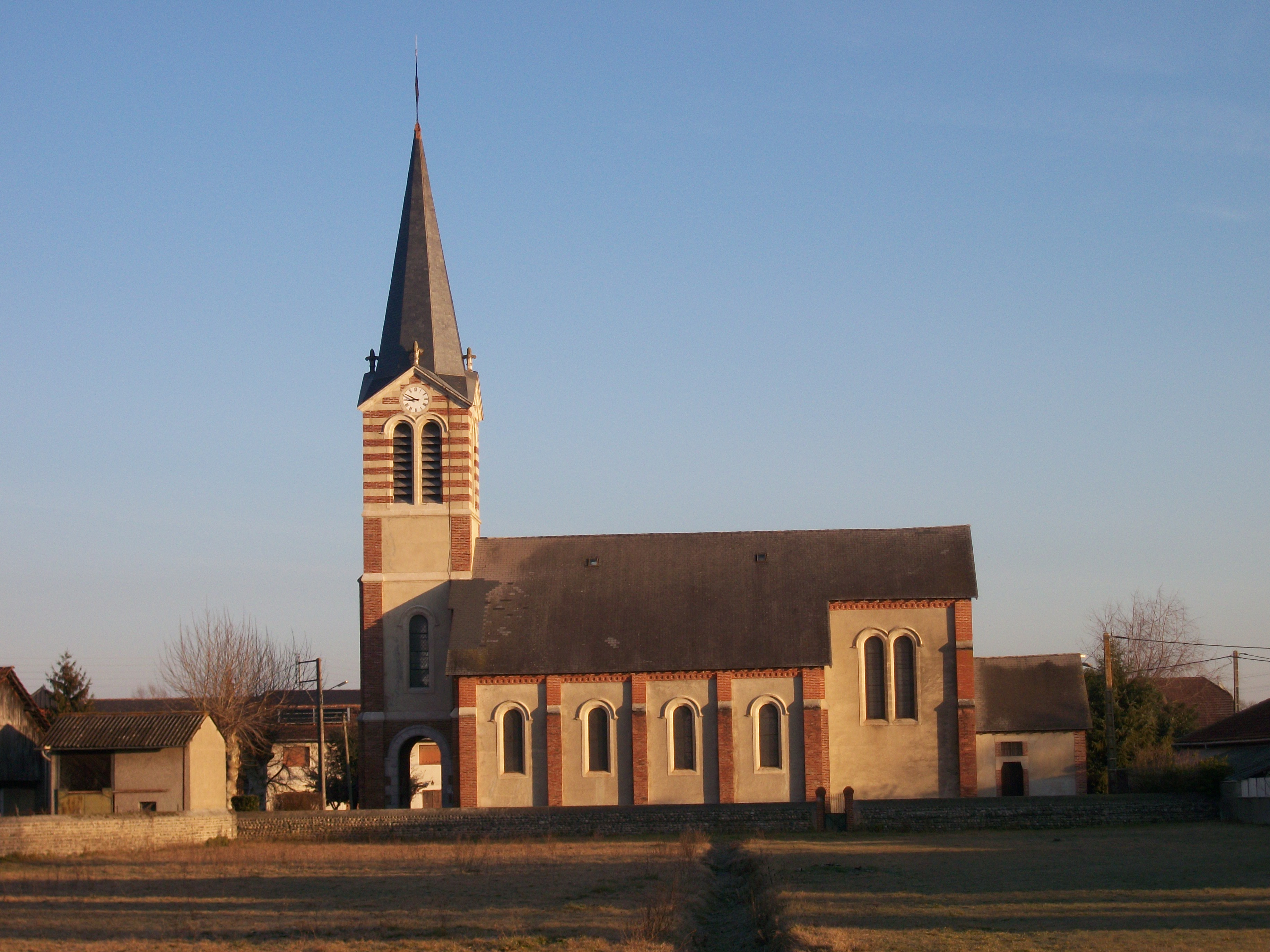 Église Saint-André de Marsac (Hautes-Pyrénées, France)